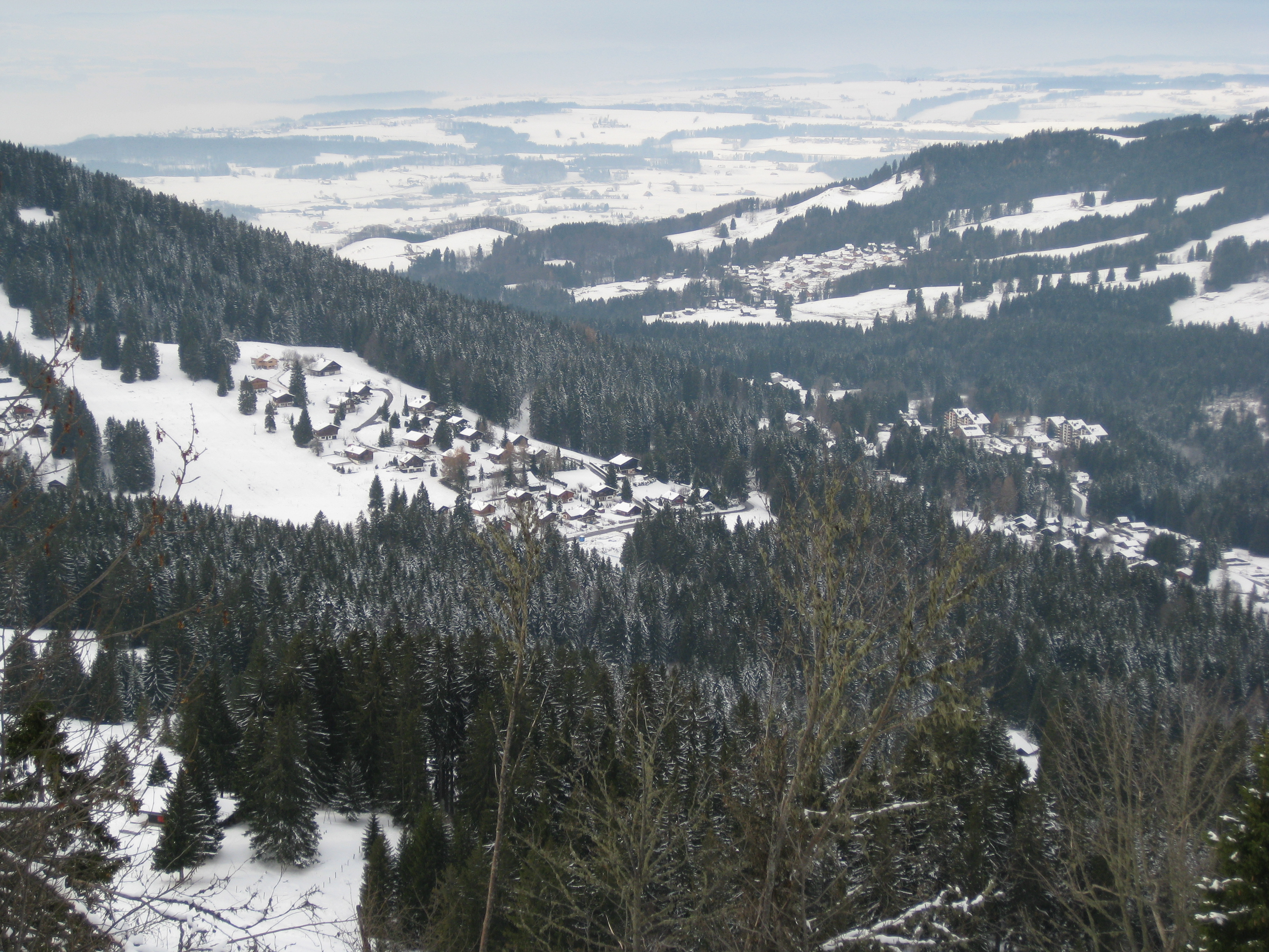 Photo des Paccots, plus précisément du quartier des Vérollys, prise depuis le sommet de la Cagne